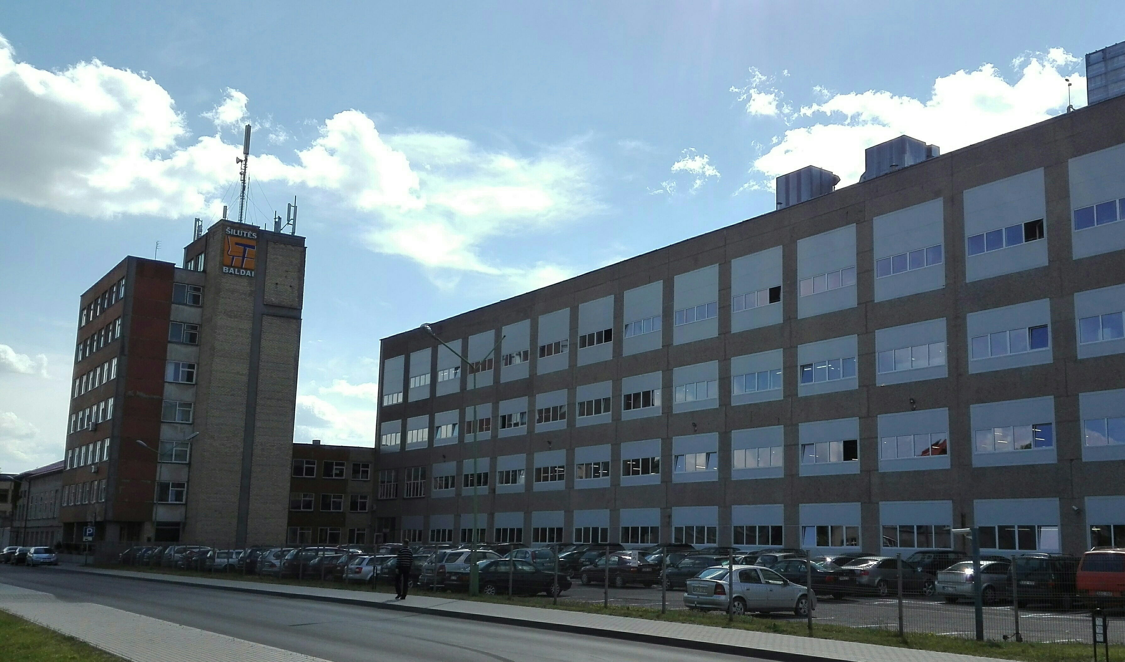 Šilutės baldai